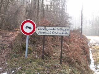 Départ du sentier en venant de la Martinèche avec le vieux panneau "enigme archéologique"